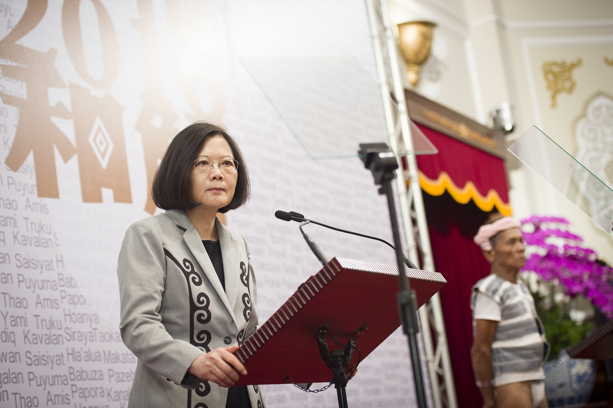 中華民國總統蔡英文正式發表向臺灣原住民族道歉文。